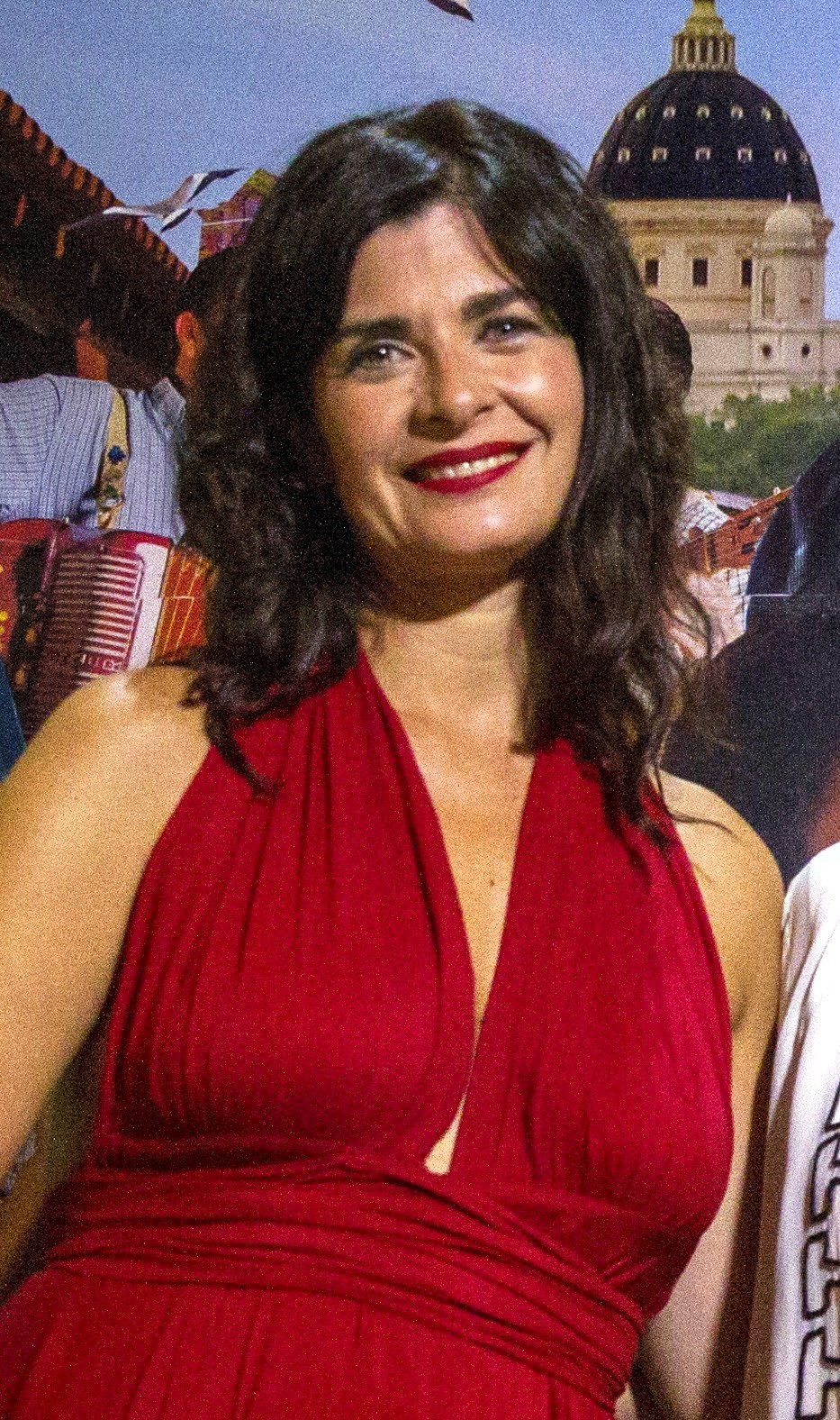 Corrientes, 26 de Enero de 2017 Elena Rogers, Soledad Villamil, Hilda Lizarazu y Valeria Gomez participaron de la 27 Fiesta Nacional del Chamamé en la ciudad de Corrientes. Juntas le dieron al chamamé un toque femenino en "Chamame Mujer" . Foto:Silvina Frydlewsky / Ministerio de Cultura de la Nación